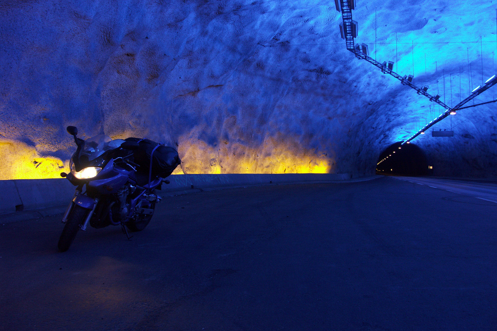 Motorsykkel i Lærdalstunnelen